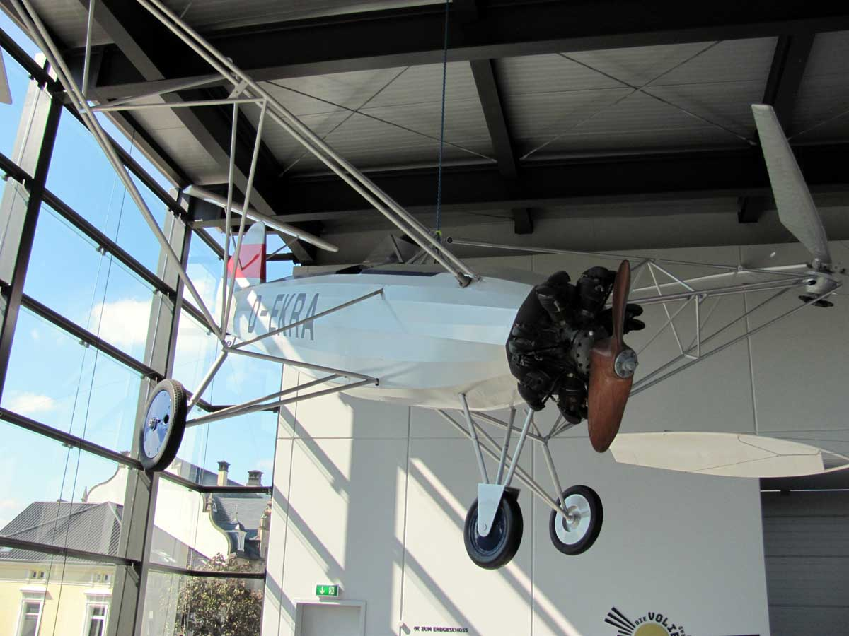 Fw 61 im Hubschraubermuseum Bückeburg 2012